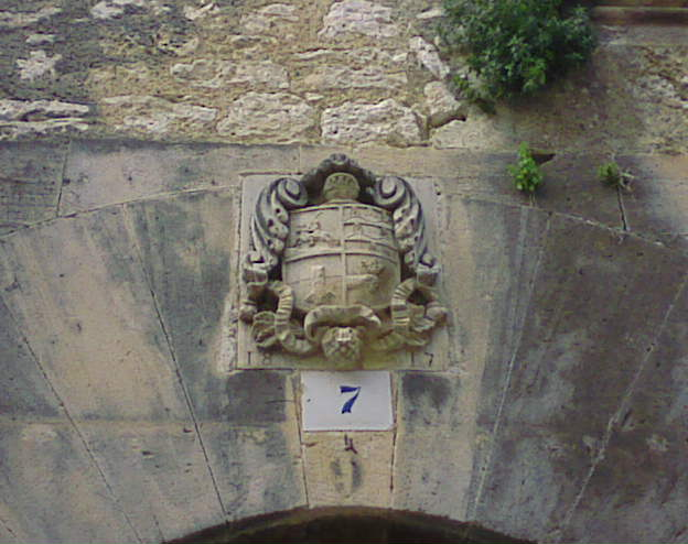 L'escut de la posada de can Socies de Tagamanent al carrer Major de Montuïri